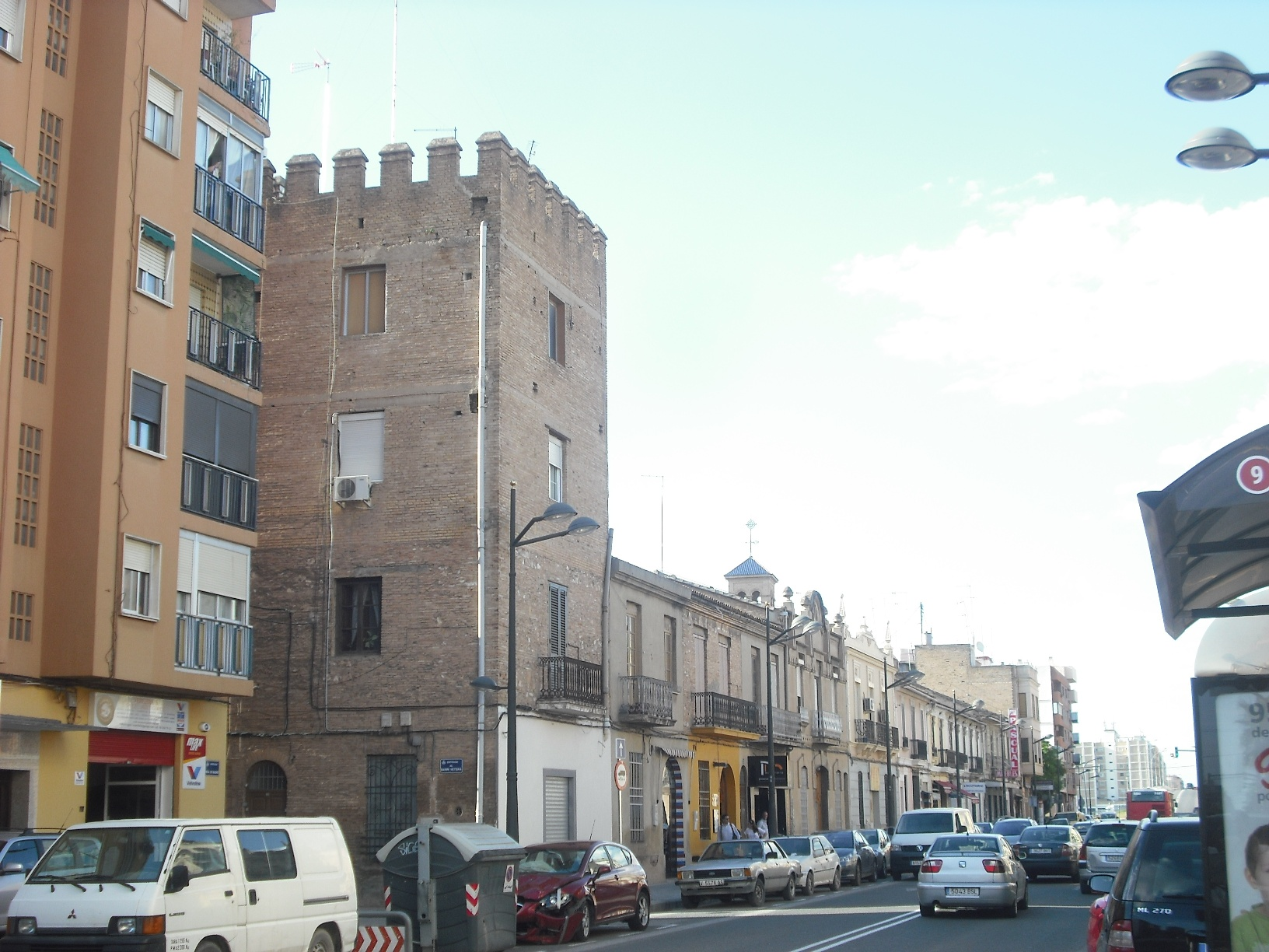 Torre de la Torre.